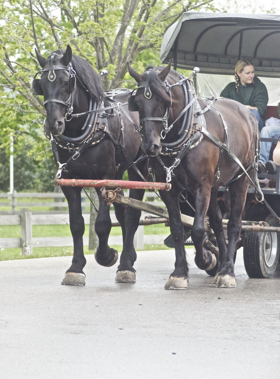 Percherons